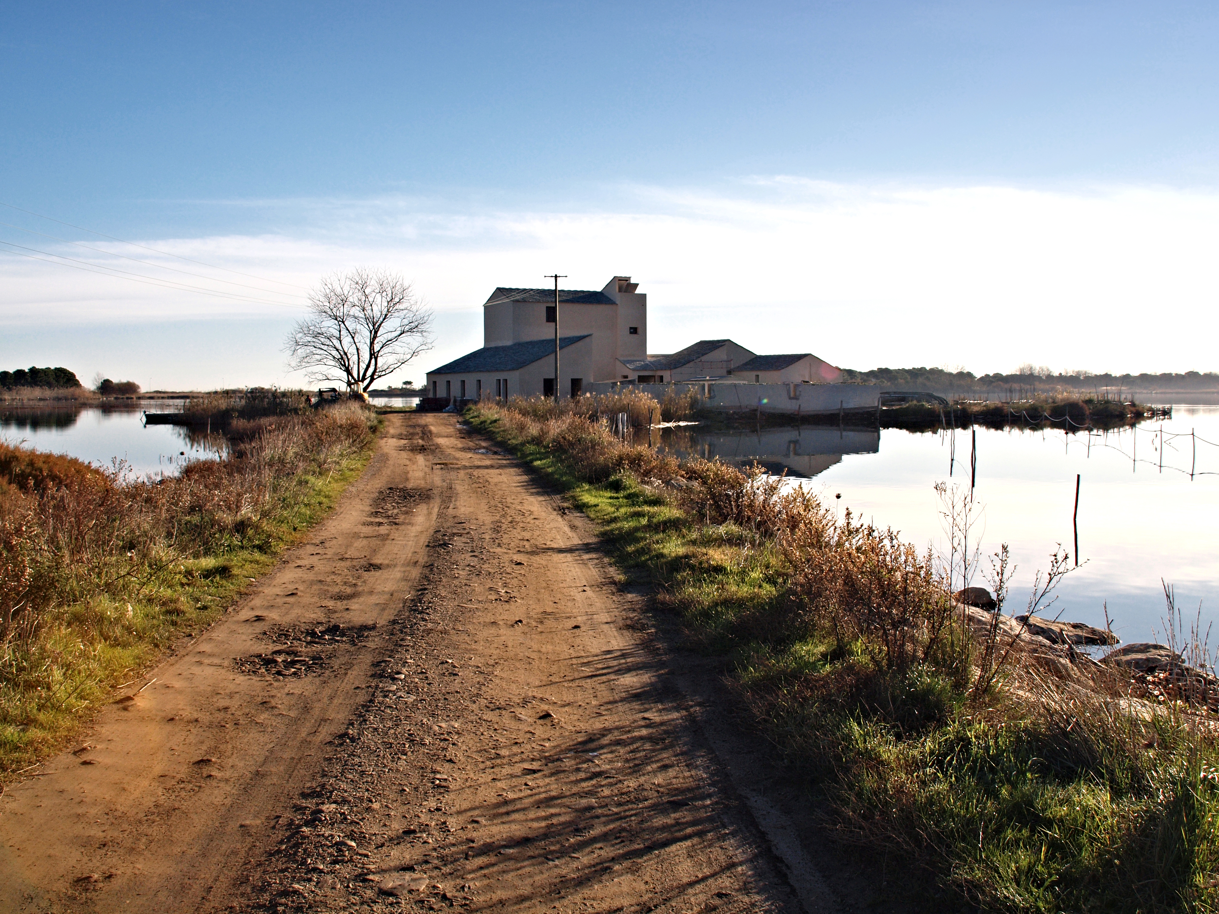 Biguglia - Fortin de l'étang en cours de réhabilitation (Décembre 2009)